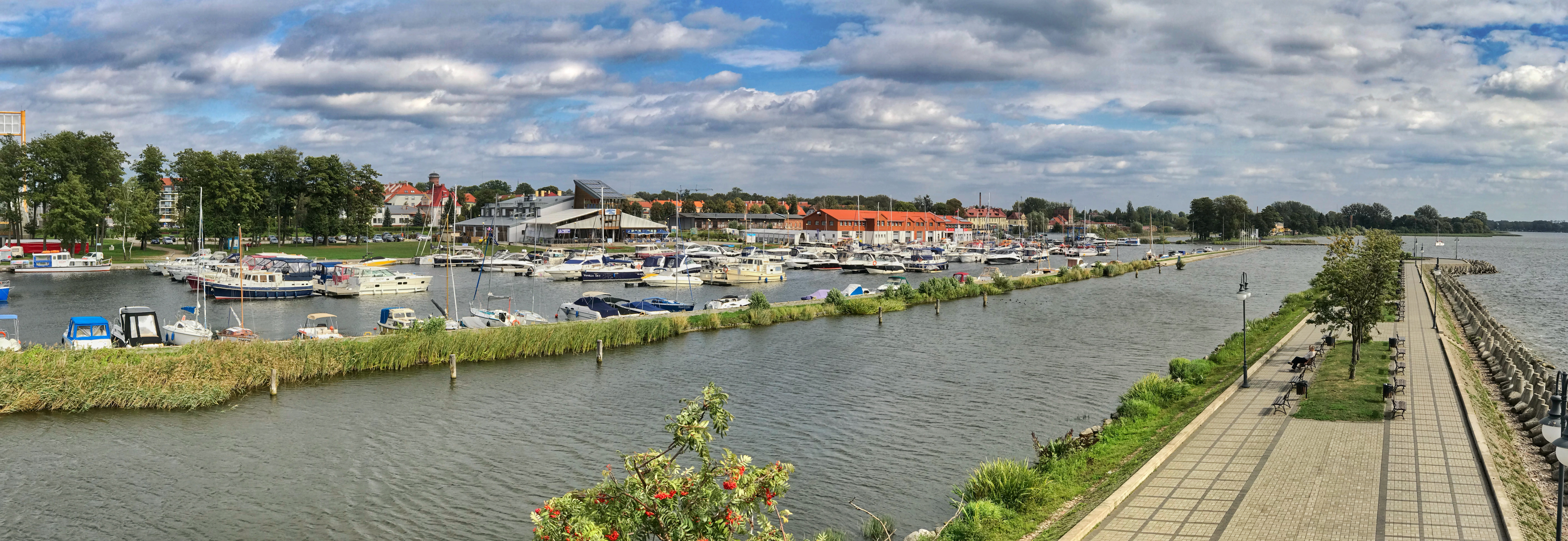 Giżycko - port